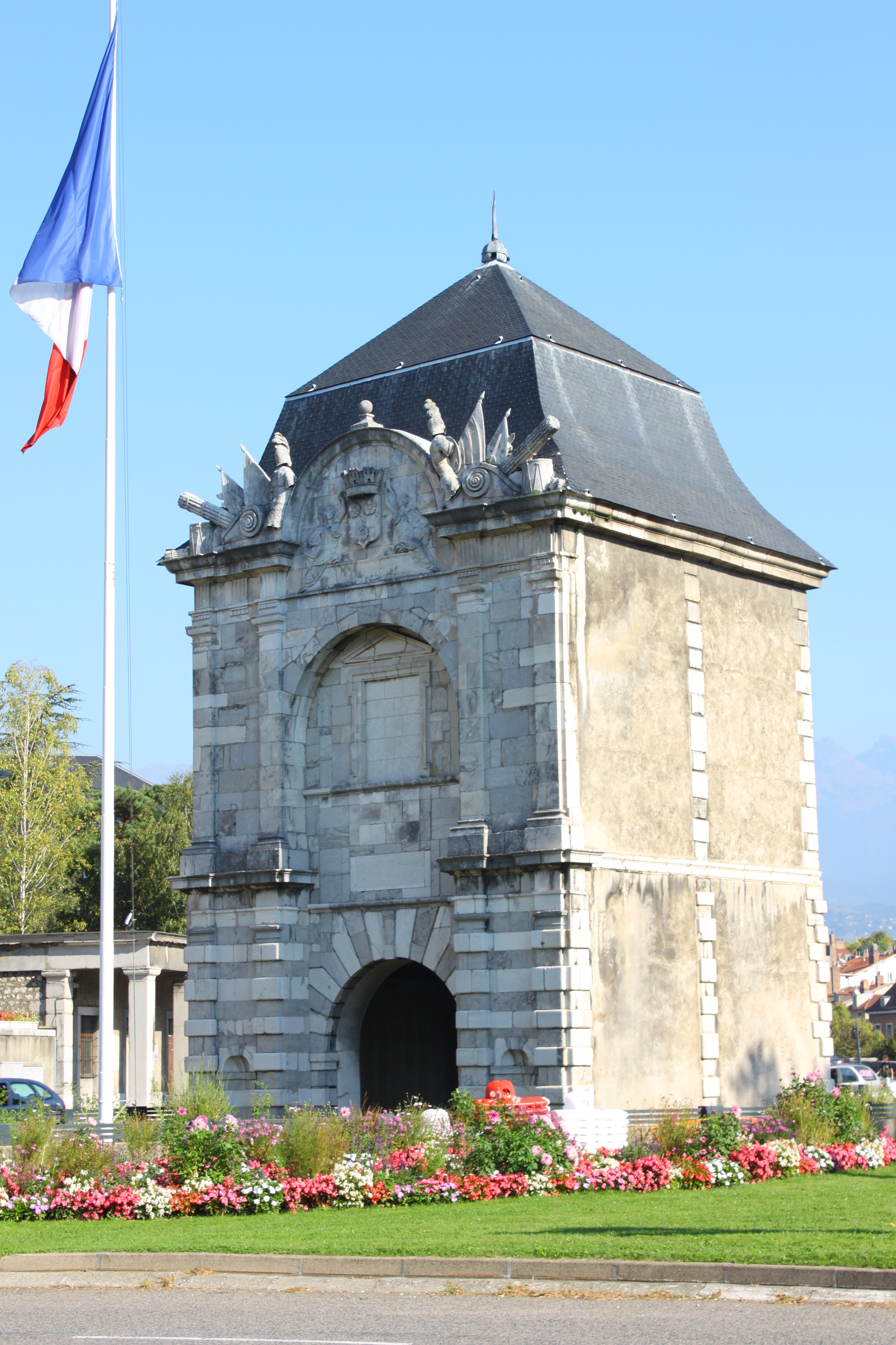 La Porte de France située à l'entrée de Grenoble